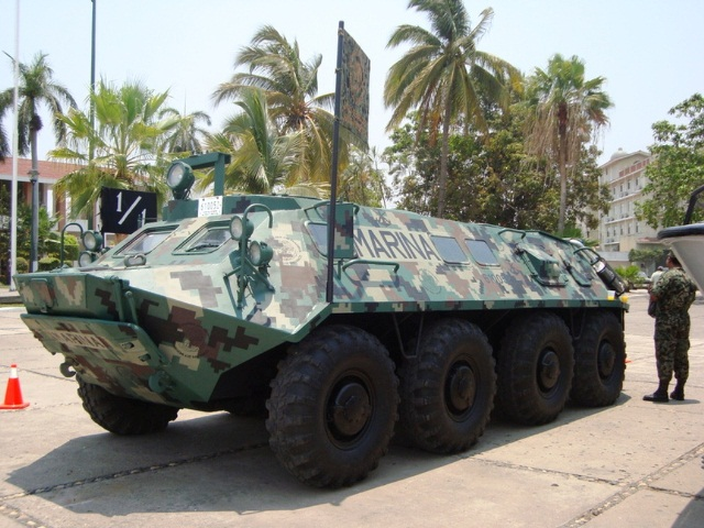 btr 60 marina armada de mexico